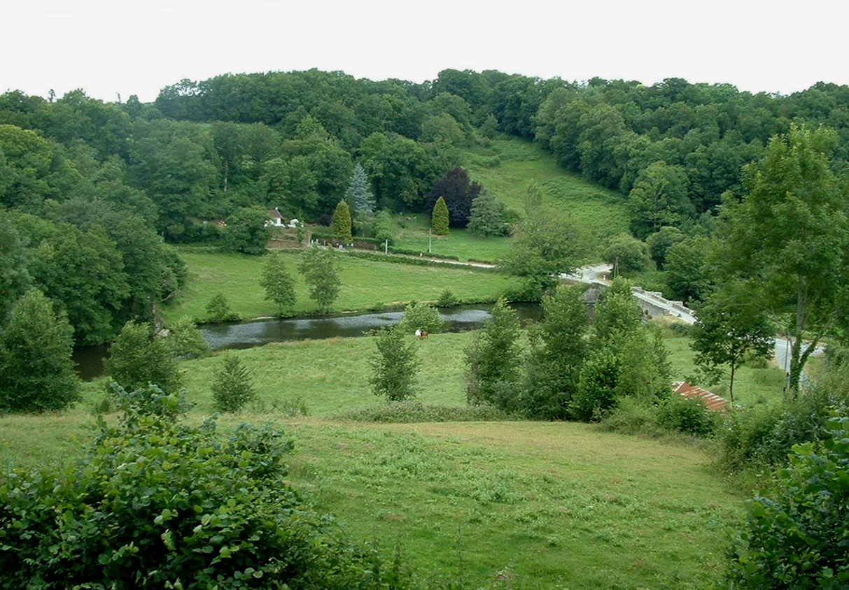 Rancon